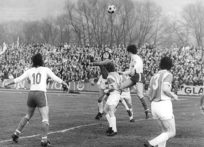 ADN-ZB-Liebers-30.3.1974-schw-Gera: Fußball-Oberliga, FC Carl Zeiss Jena - 1. FC Magdeburg 1:2 - Im Ernst-Abbe-Sportfeld von Jena setzte sich der 1. FC Magdeburg an die Spitze der DDR-Oberliga-Tabelle. Unser Foto zeigt eine Spielszene vor dem Magdeburger Tor zwischen Torhüter Ulrich Schulze (2.v.l.) und Eberhard Vogel (3.v.r.).